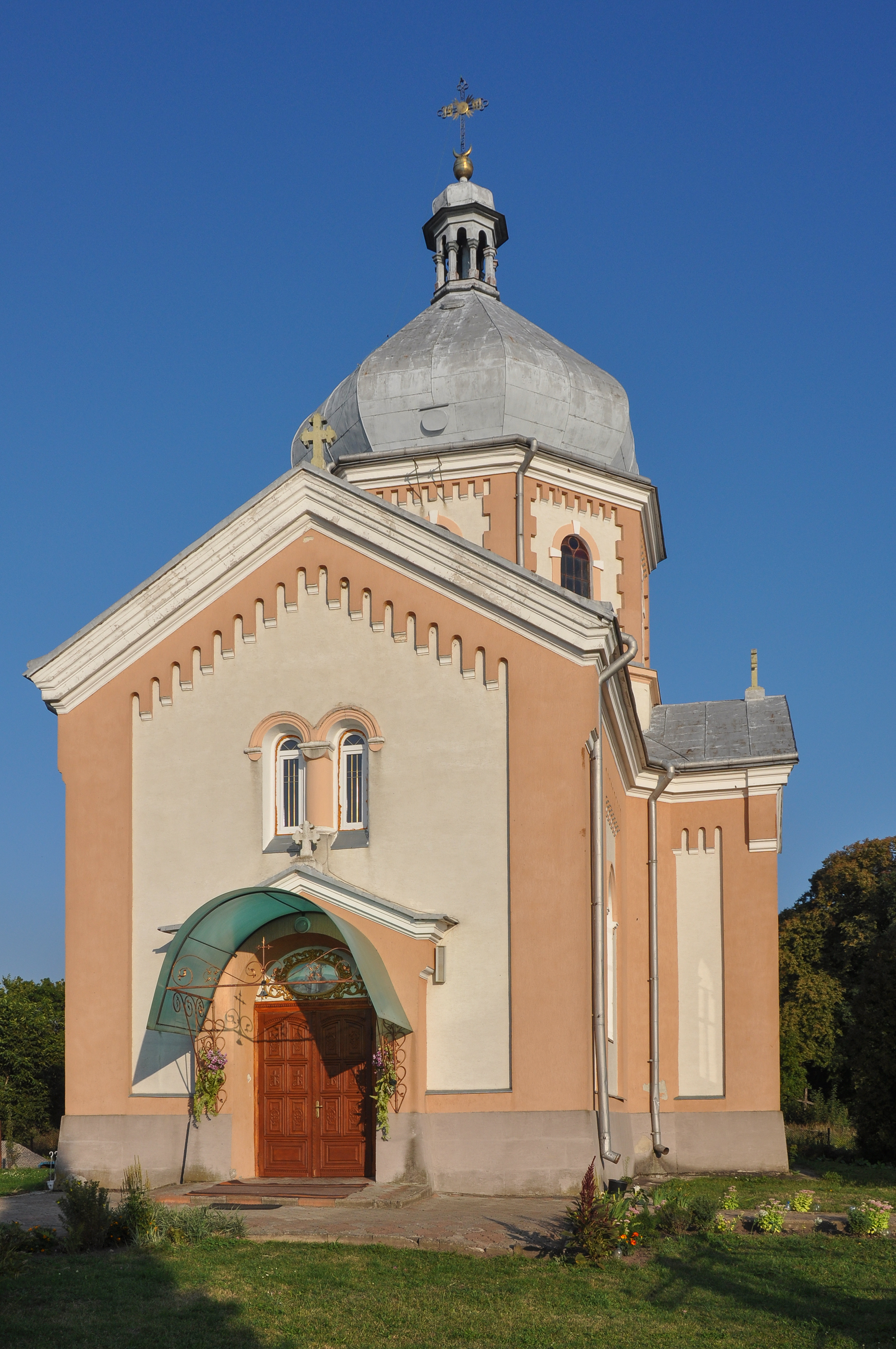 Церква Різдва Христового (мур.), с. Стрілки